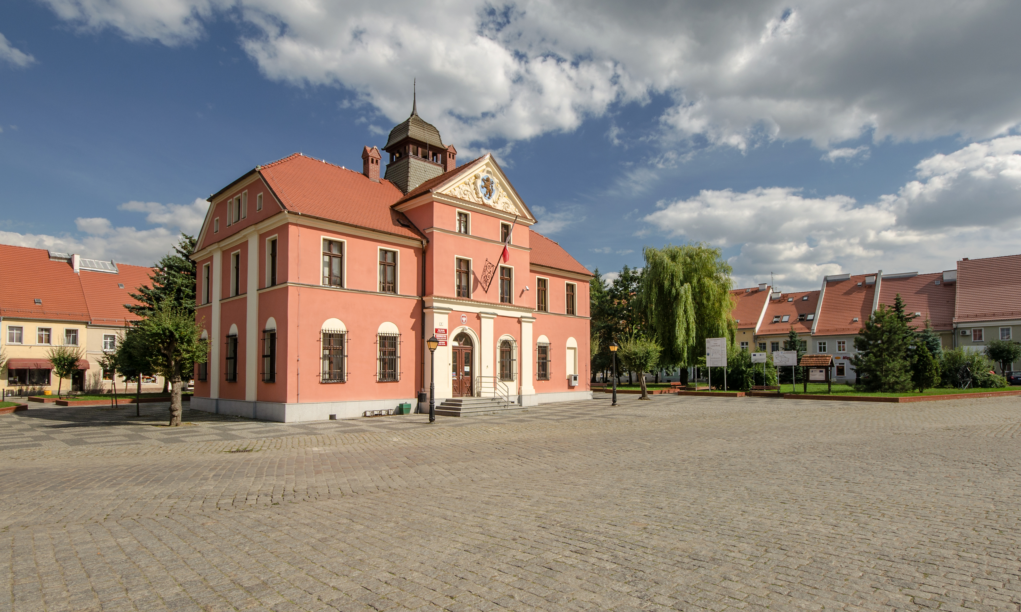 Lewin Brzeski, ratusz